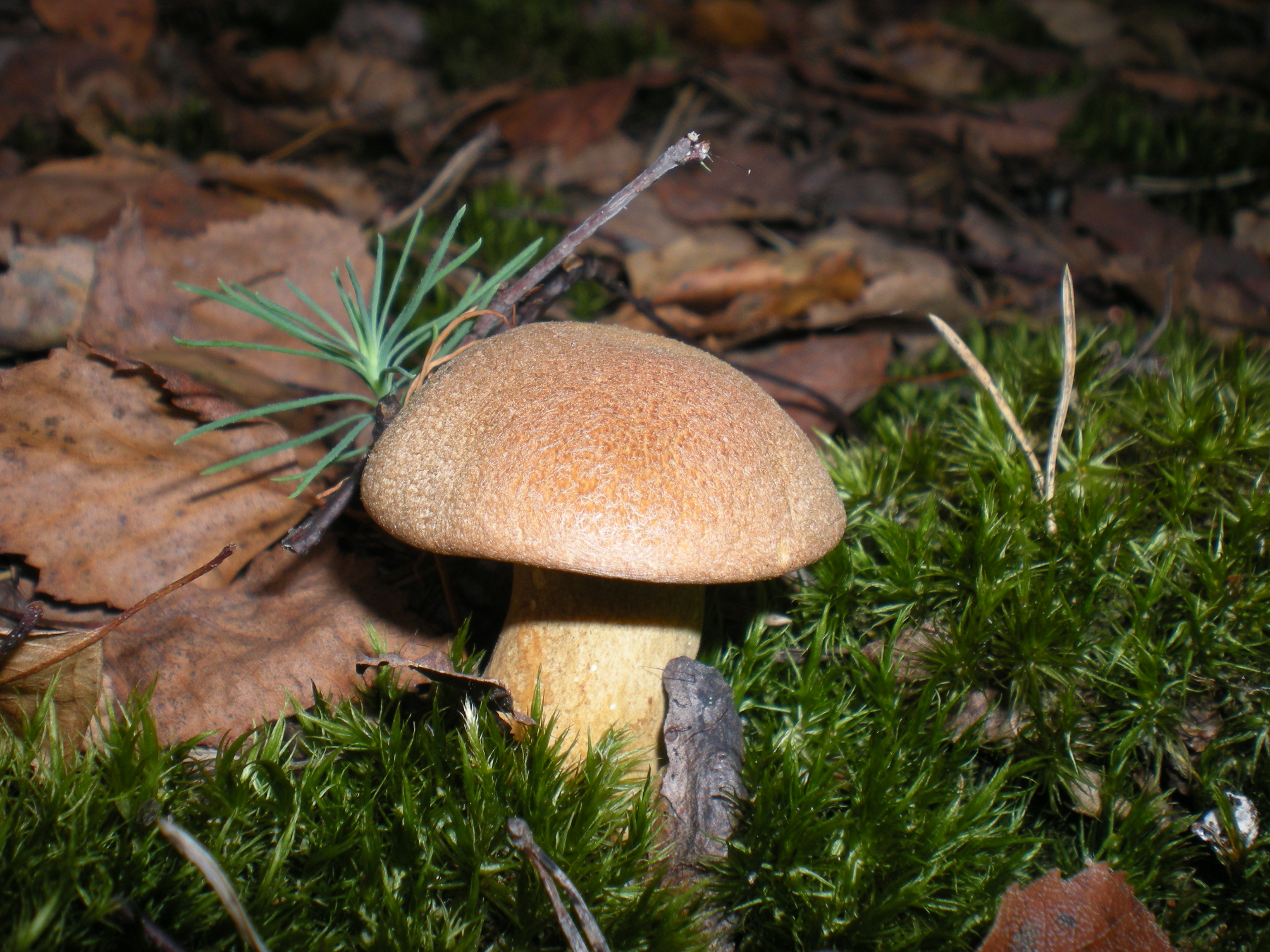 Maślak pstry (Suillus variegatus), Wólka Łękawska, Polska, 51°18'24"N, 19°23'34"E (51.3065, 19.3928)